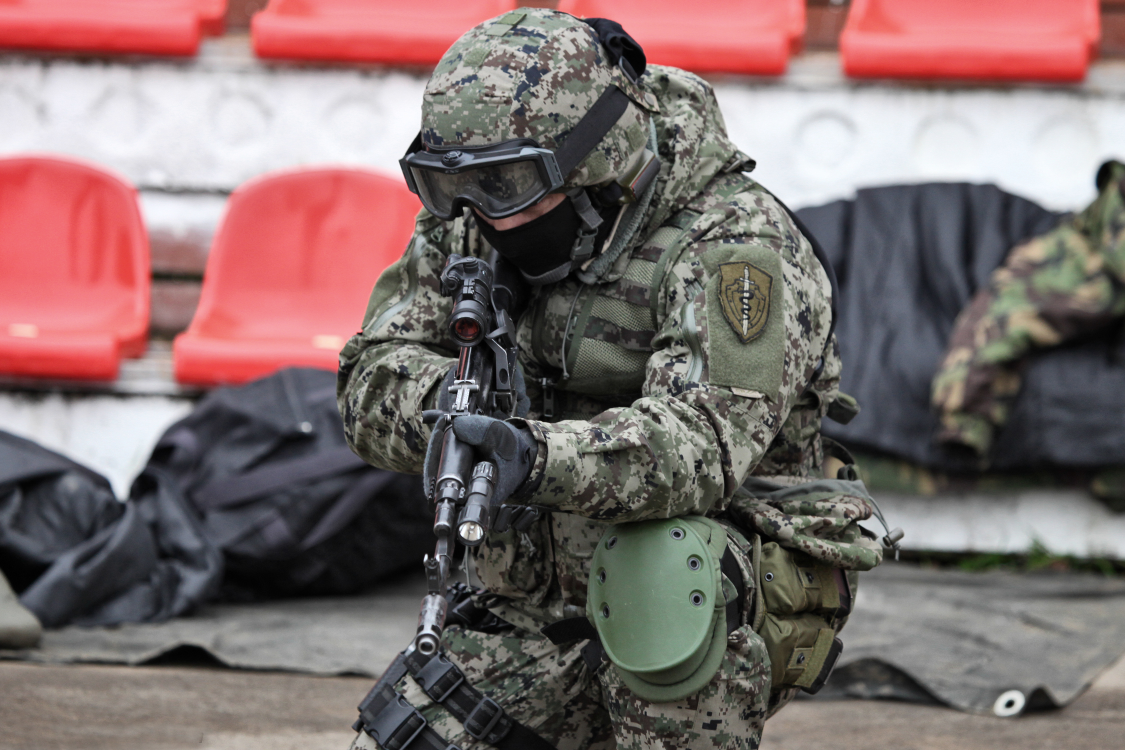 ОСН Гром ФСКН России (Grom Special purpose unit of Federal Drug Control Service)